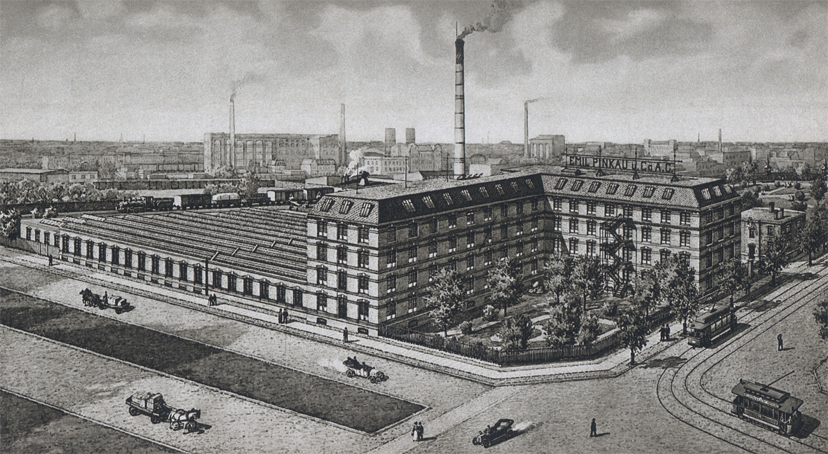 Emil Pinkau & Co AG: Fabrikanlagen 1923